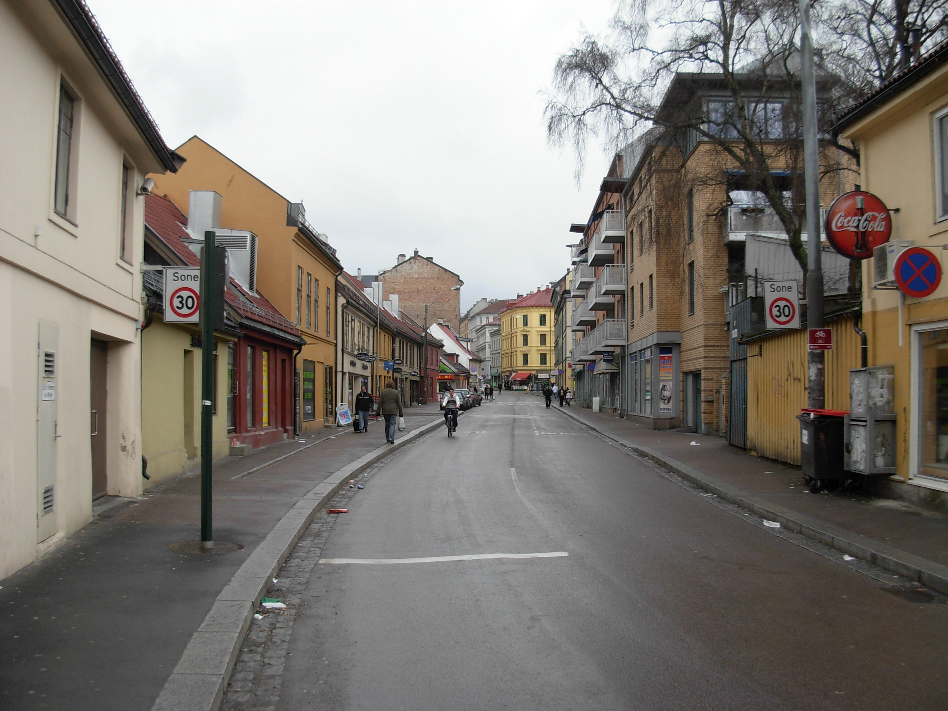 Tøyengata seen from Grønland, Tøyen, Oslo